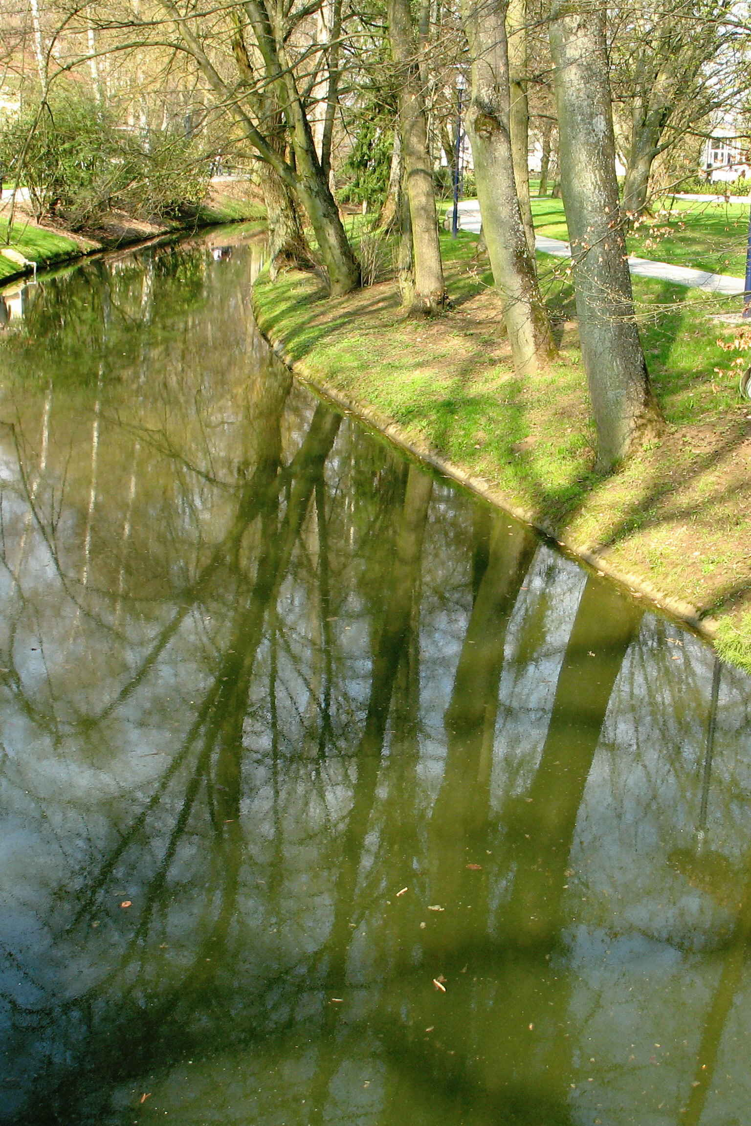 Zu Munneref am Park. Kategorie:Gemeng Munneref Gander